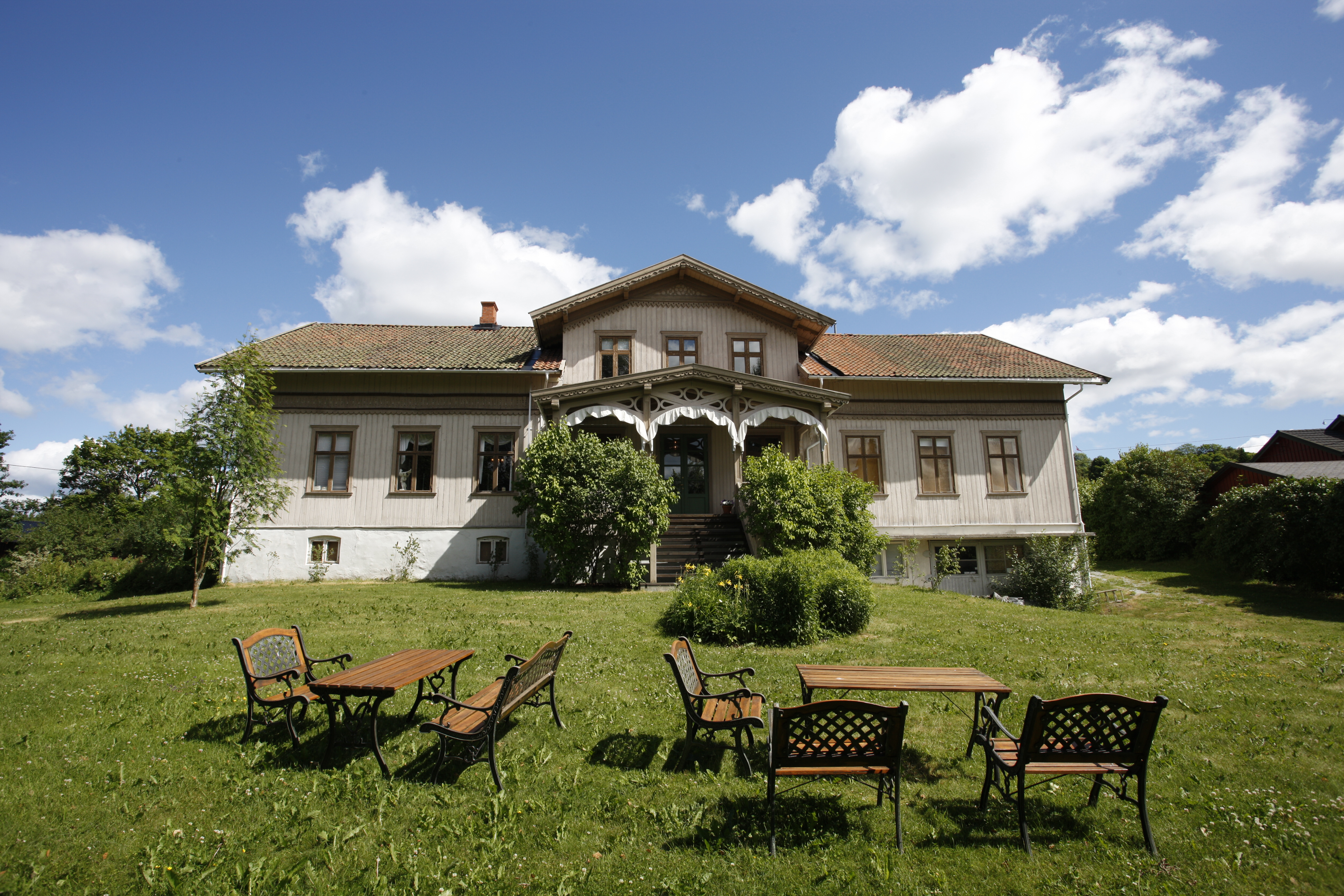 Kvinnemuseet i Øvrebyen.